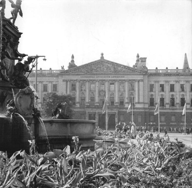 Leipzig, Universität, Hauptgebäude Zentralbild Koch-Reckleben Ni-Noa 14.10.1959. 500 Jahrfeier der Karl-Marx-Universität Leipzig. Gebäude und InstätuteUBz: Das durch anglo-amerikanische Bomben zerstörte Gebäude der Universität, Das Augusteum Literarum Lipsiensis.